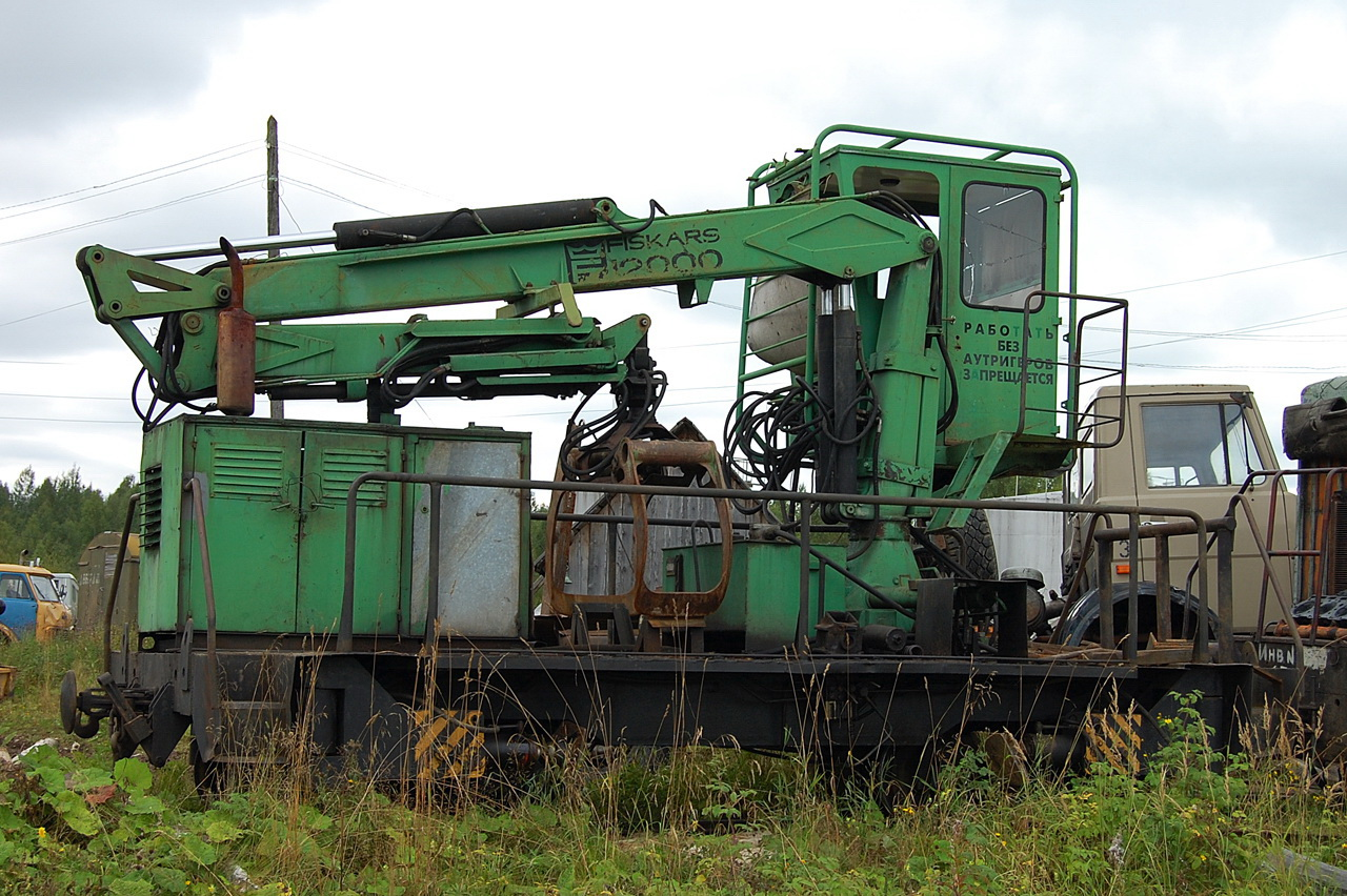 Лойгинская УЖД